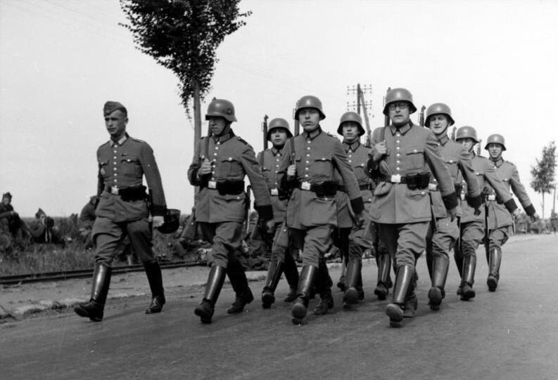 Schutzpolizei